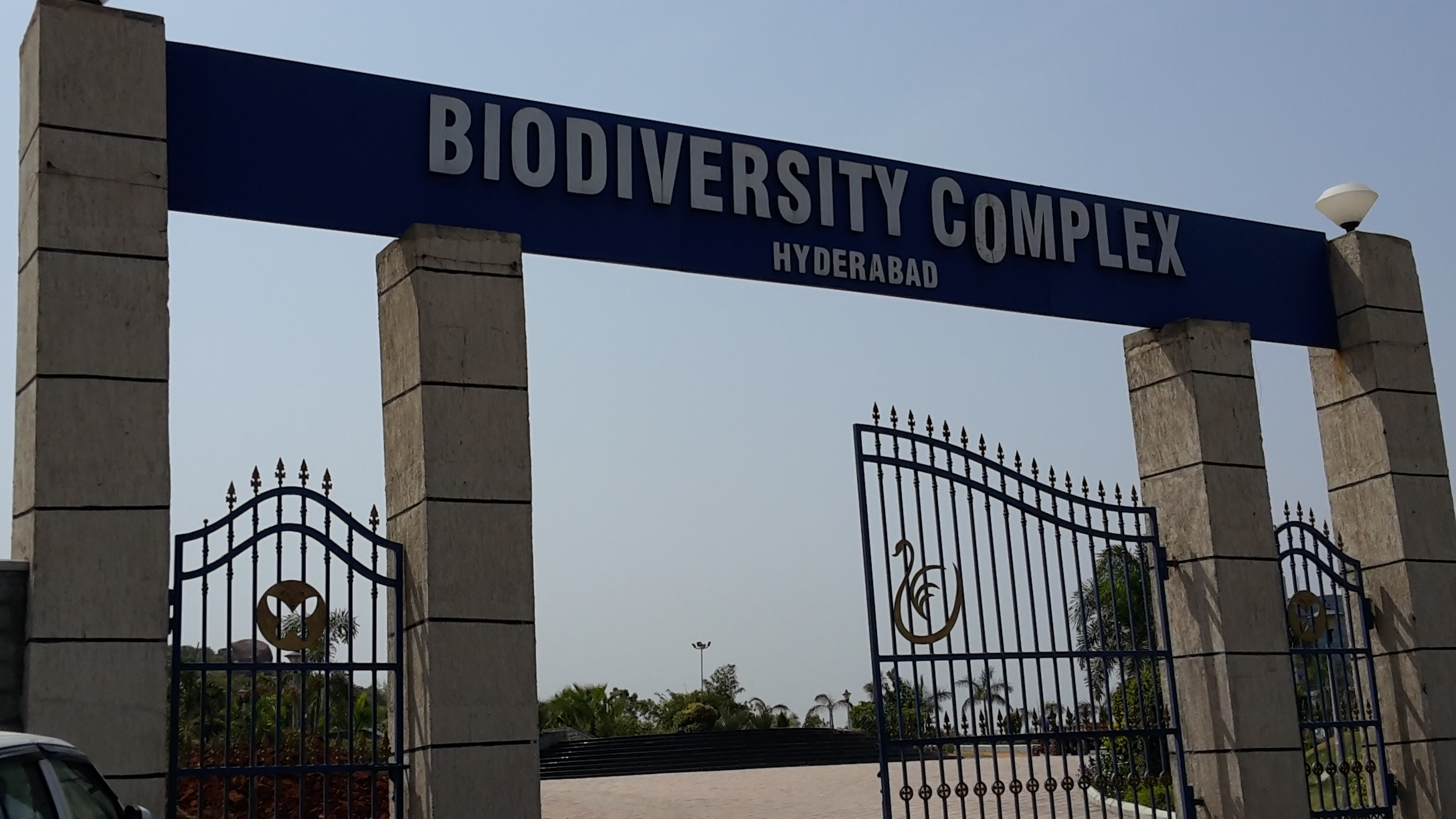 Main entrance for the park complex